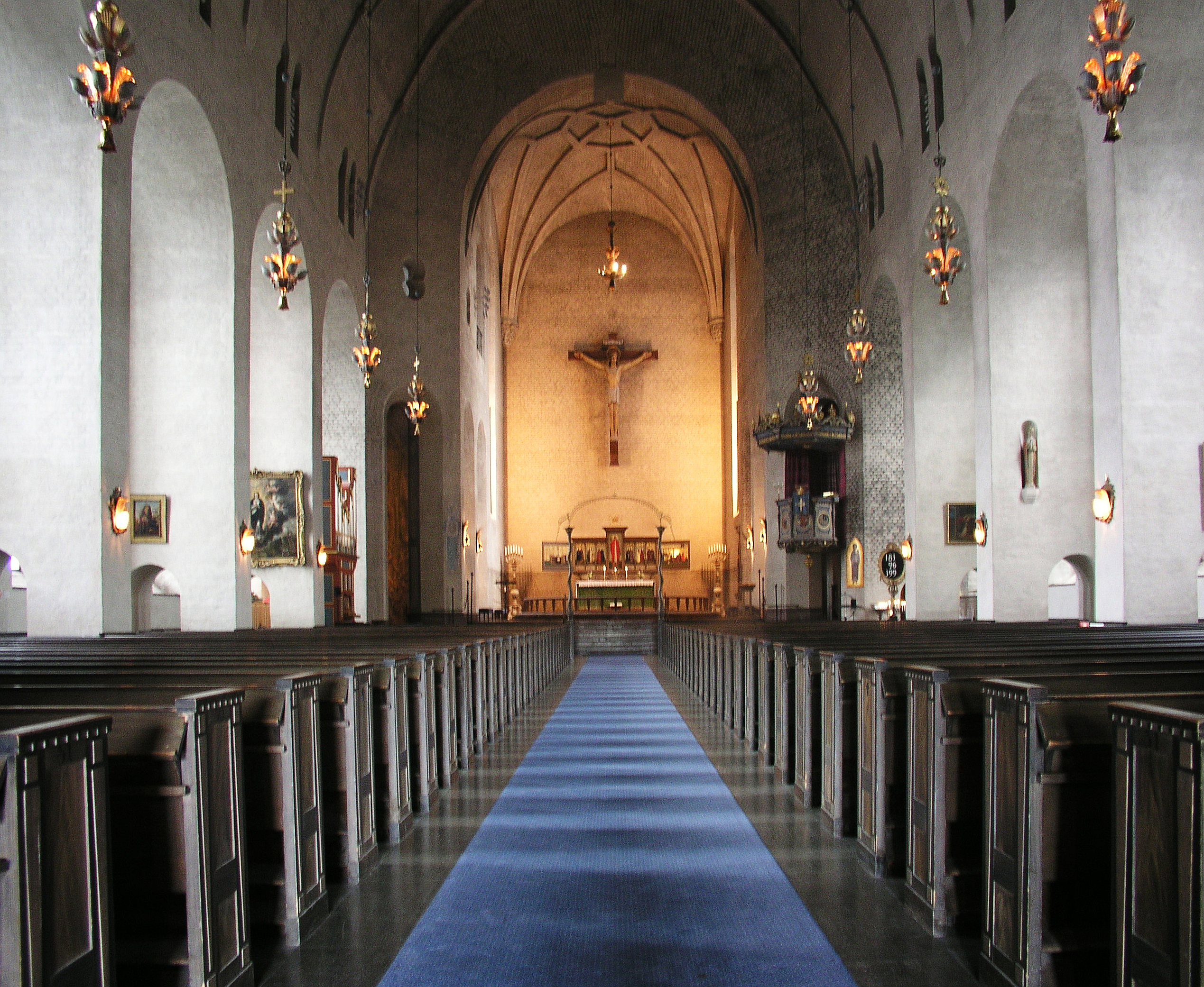 Högalidskyrkan, Diocese of Stockholm, Sweden. Spires.